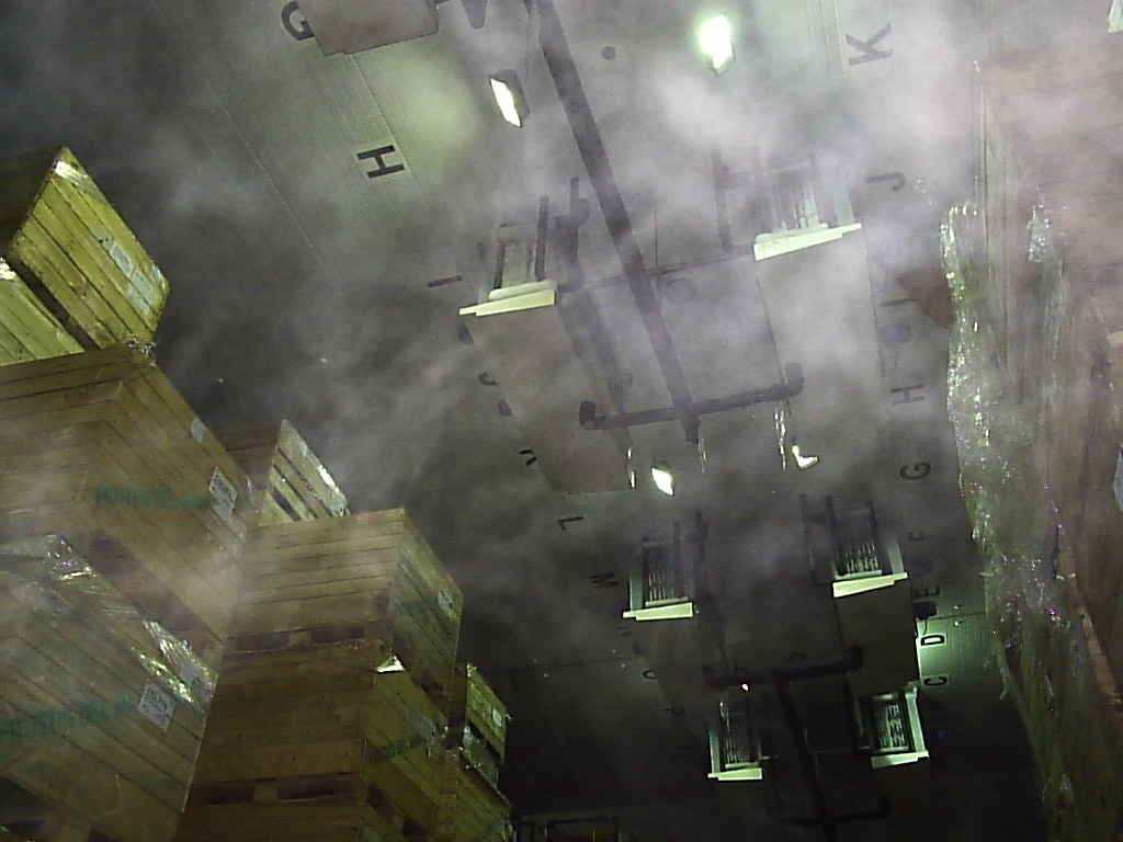 Evaporadores inundados en cámara de refrigeración para conservación de frutas. Sistema frigofífico de tanque de recirculado de Amoníaco (NH3).